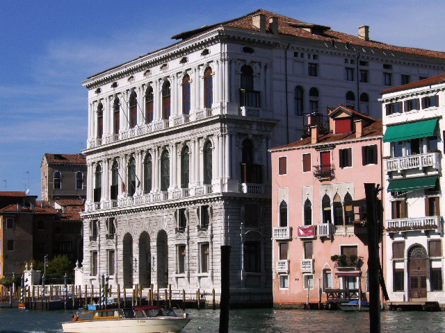 Palazzo Corner della Ca' Granda (Venice) shot from Traghetto San Gregorio